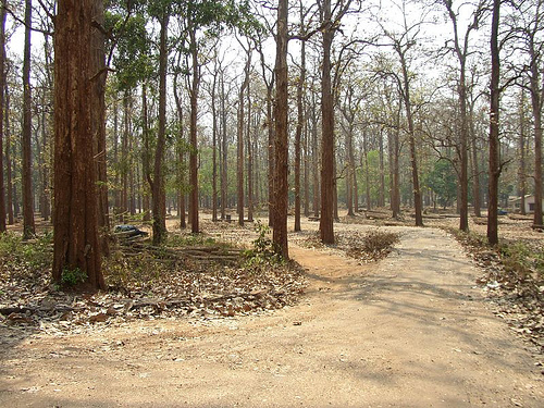 Nilambur Teak